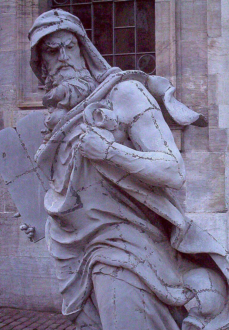 Moses, Frederikskirken, Marmorkirken, København, Carl Rohl-Smith